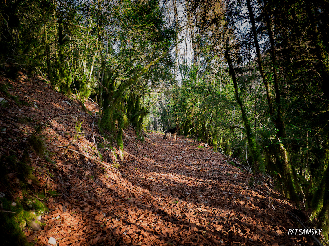 Les Bouchoux